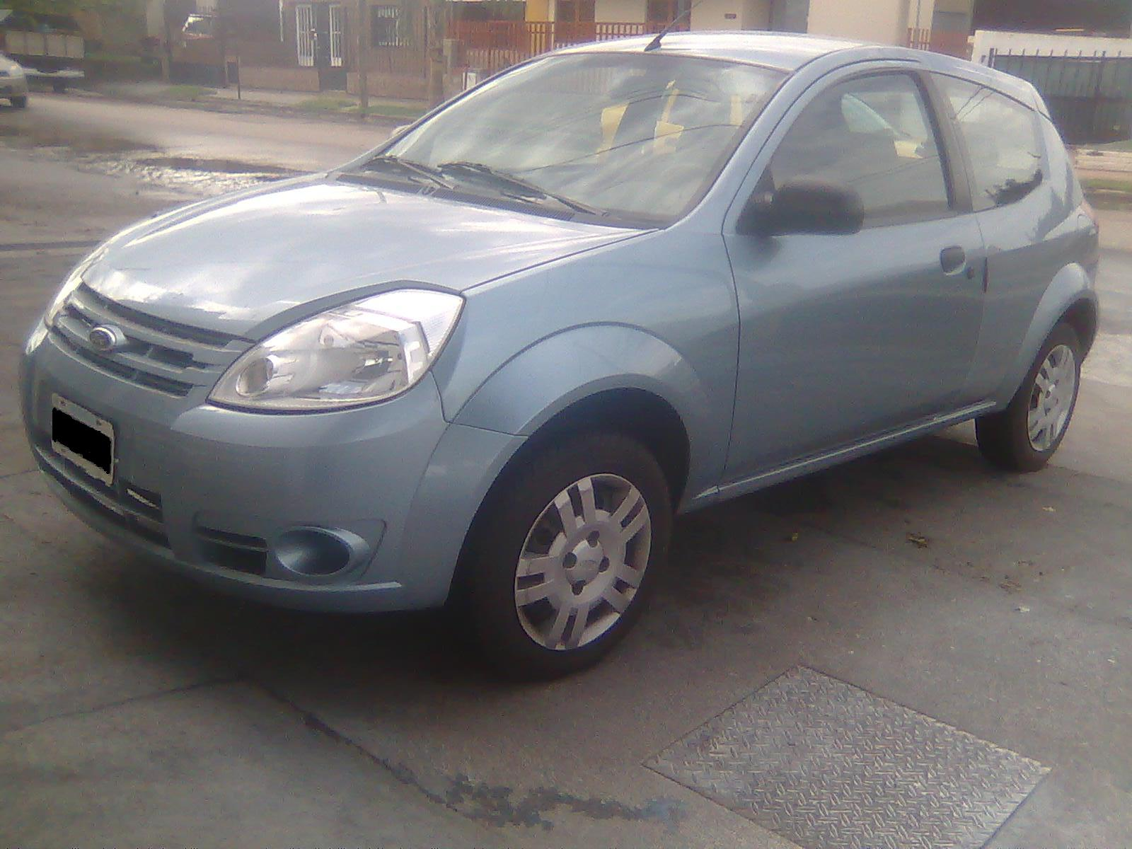 Ford Ka Sudamerica